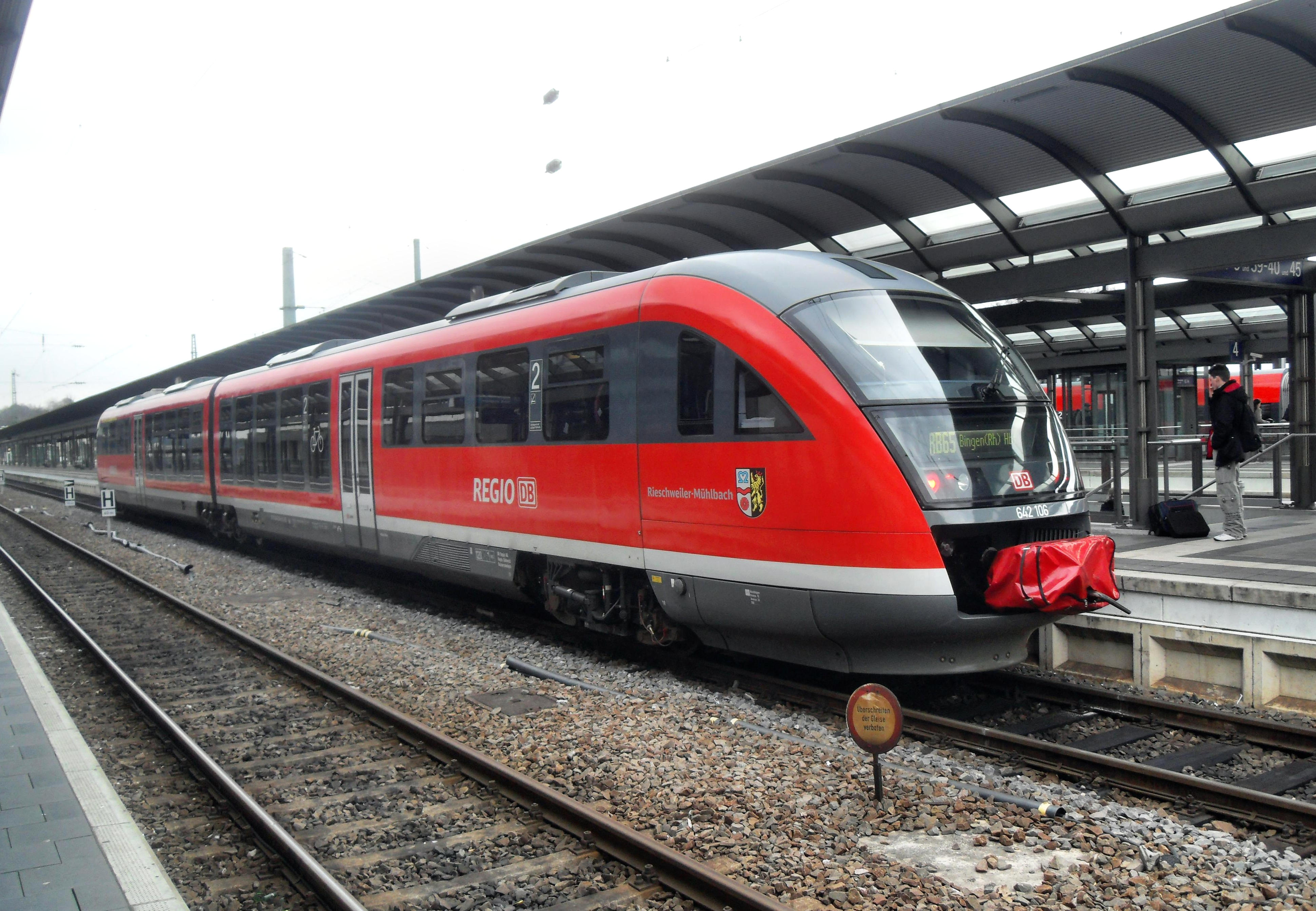 Regionalbahn im Kaiserslauterner Hauptbahnhof auf dem Weg nach Bingen über die Alsenztalbahn